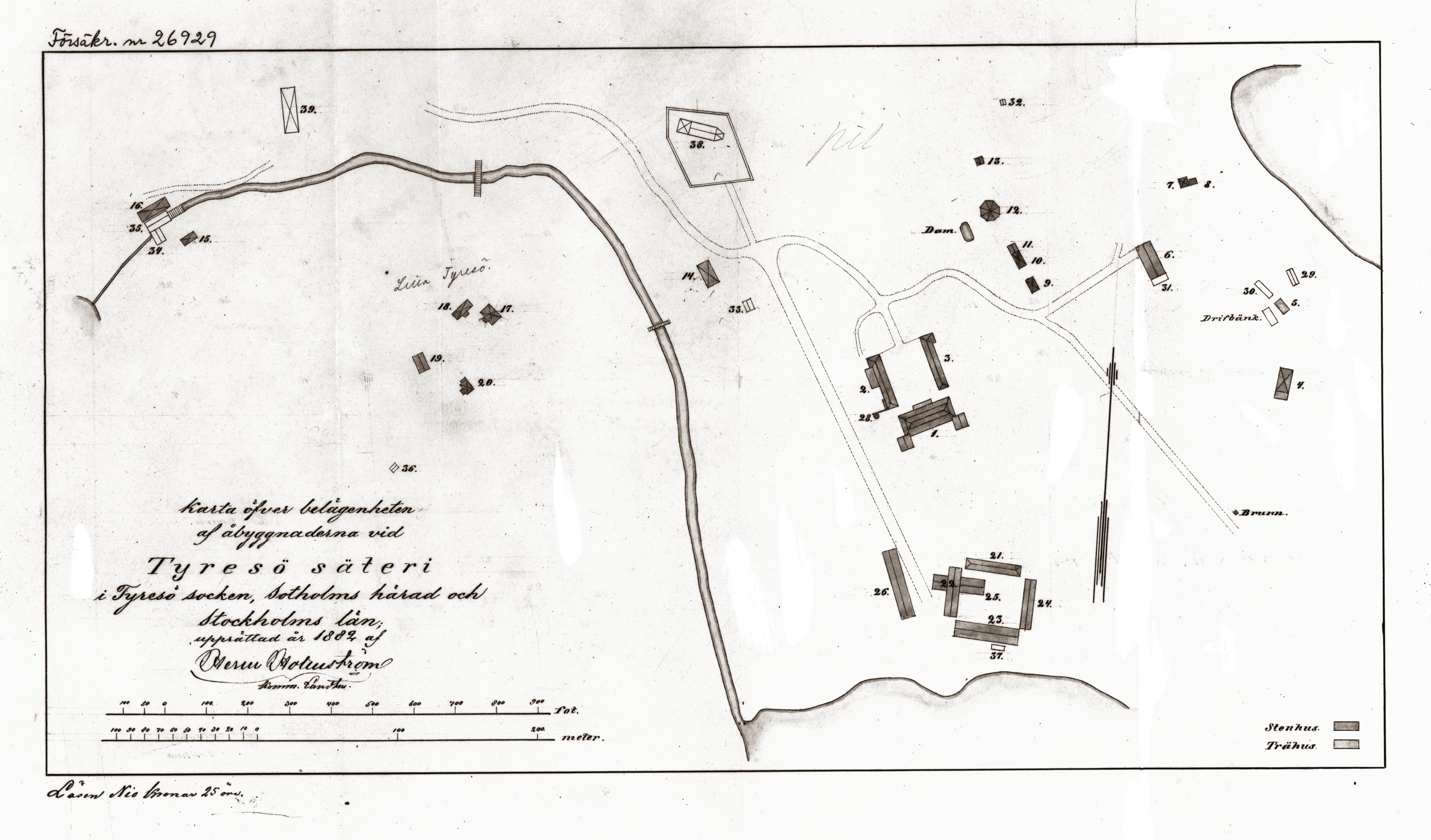 Karta över Tyresö säteri, 1882 Depicted place: Q10674110 (Q10674110) (Härad), Q57312460 (Q57312460) (Ortnamn därutöver), Q10707706 (Q10707706)